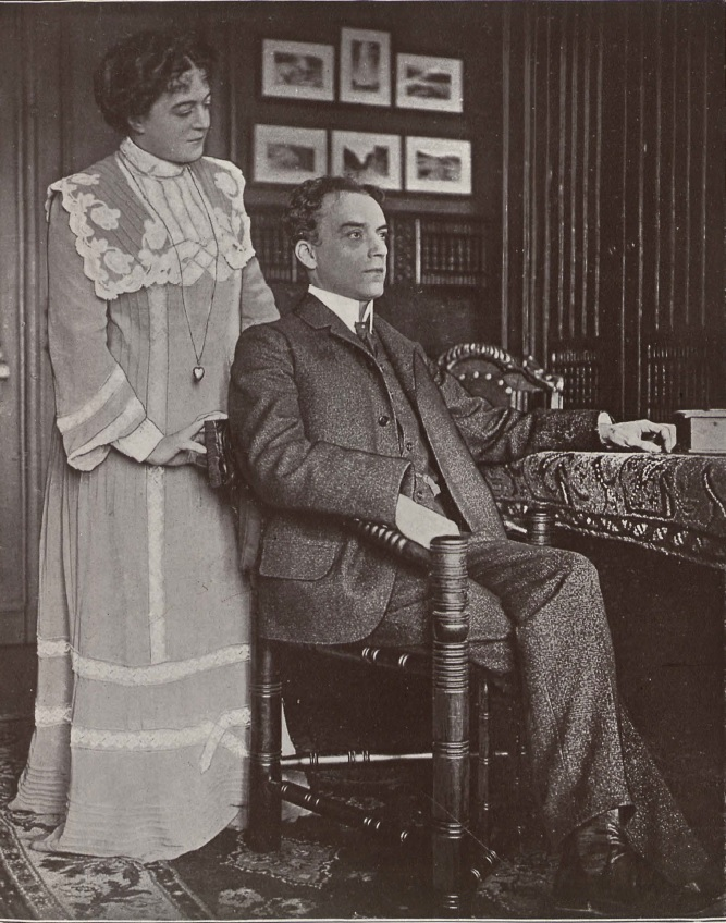 Otto Sommerstorff, österreichischer Schauspieler, komischer Dichter und langjähriger Mitarbeiter der „Fliegenden Blätter“ und seine Ehefrau, die Schauspielerin Theresina Gessner.